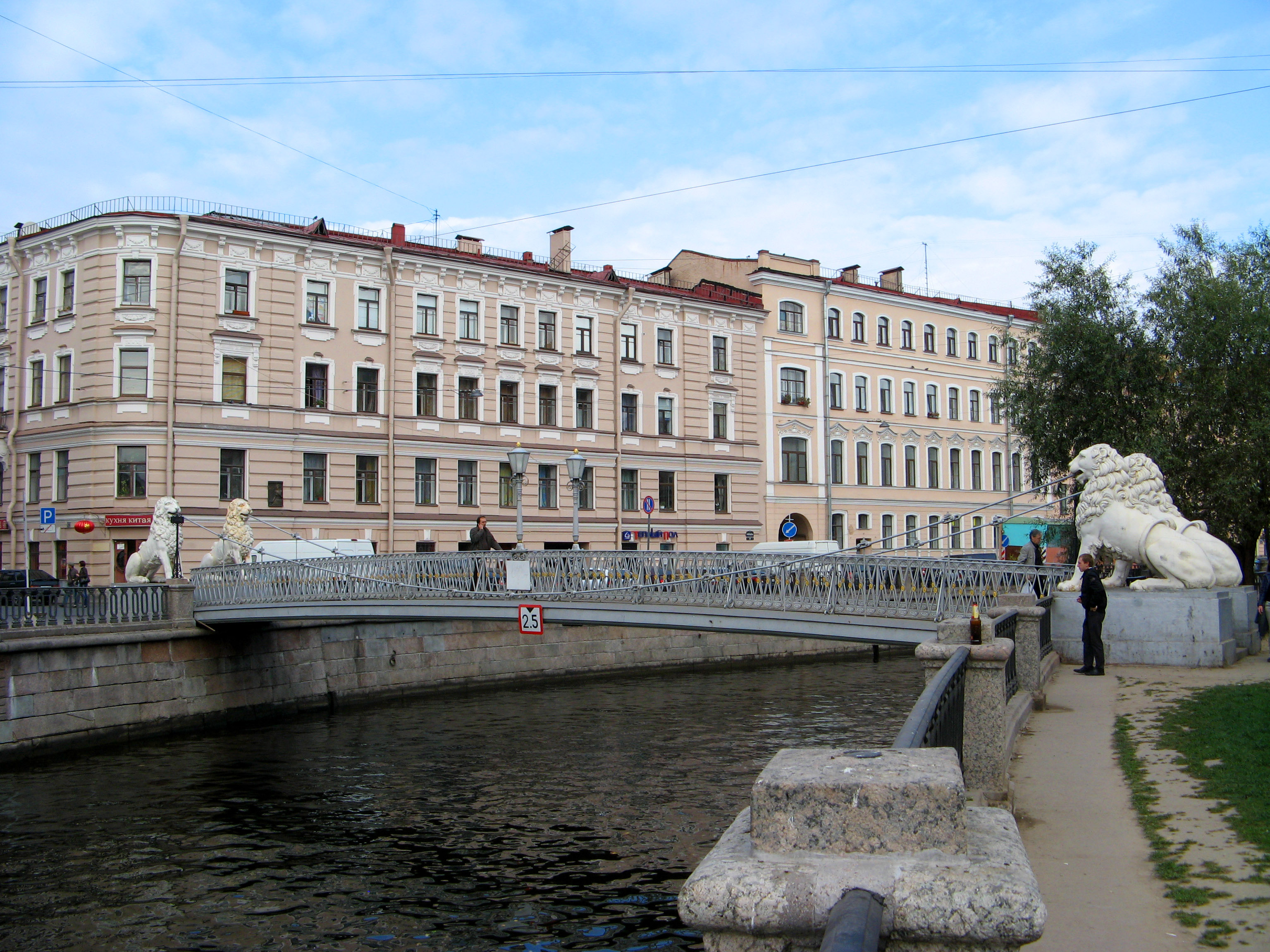 Мост Львиный (Санкт-Петербург, через канал Грибоедова напротив Малой Подьяческой улицы)